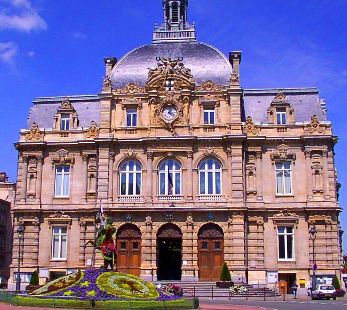 Entrée de l'Hôtel de Ville de Tourcoing